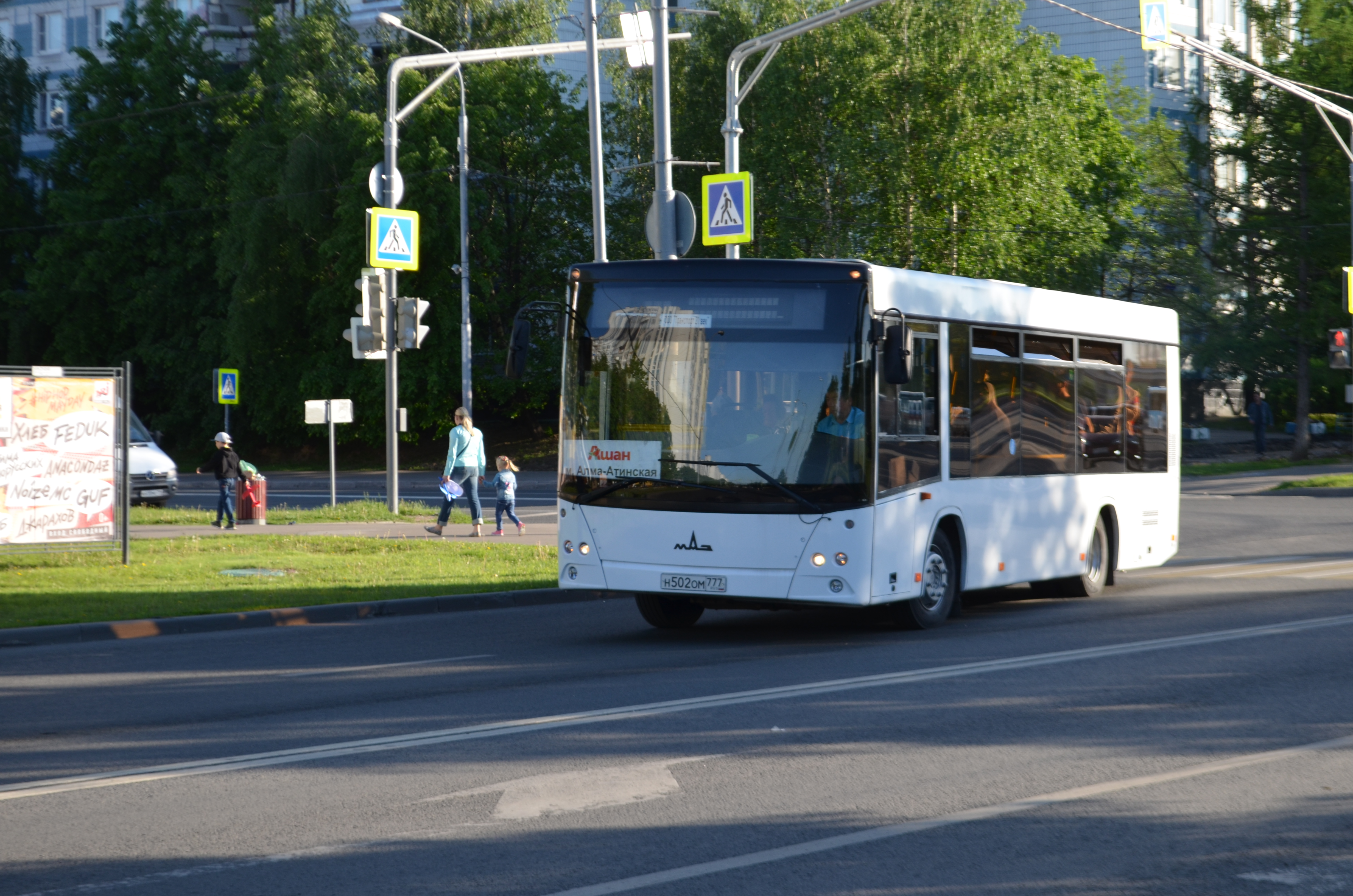 Маршрутка (мини-автобус) «Ашан-Братеево» — метро «Алма-Атинская» на улице Борисовские Пруды в районе Братеево.